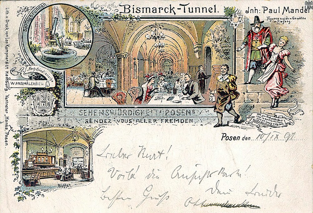 Poznań. Restauracja „Tunel Bismarcka“